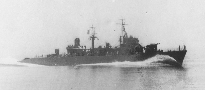 日本海軍第一号型輸送艦『第一号輸送艦』、東京湾